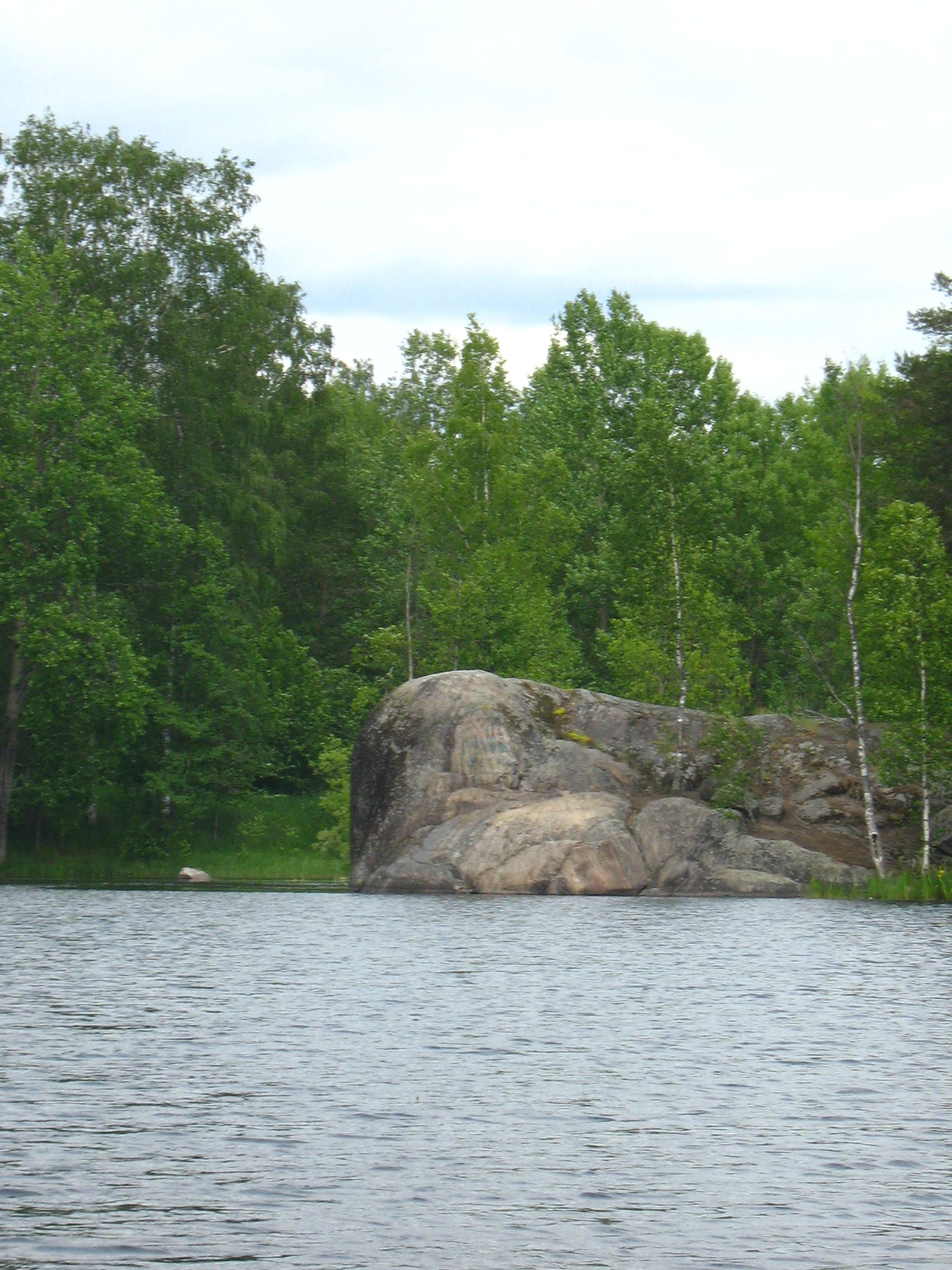 Melnikovo, Leningrad oblast, Priozersk region. Vuoksa